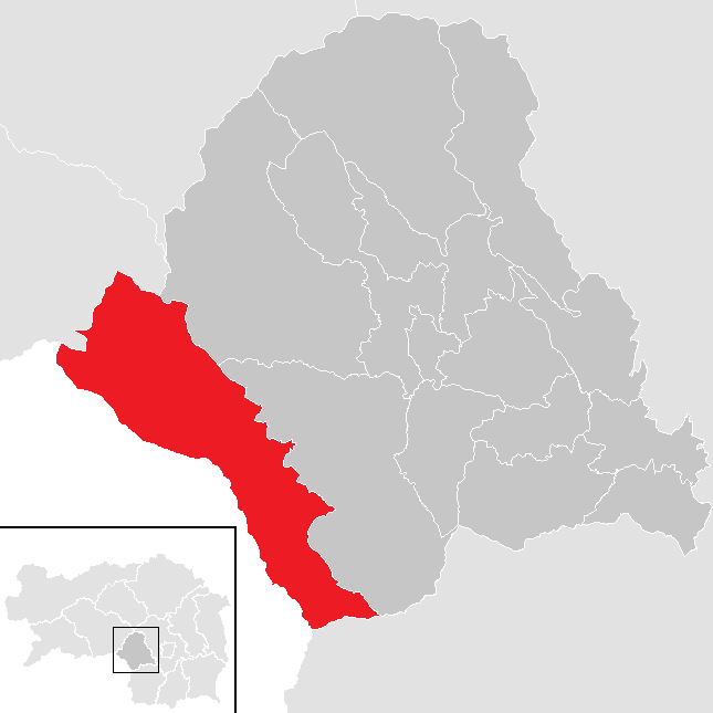 Lage von Hirschberg-Patt im Bezirk Voitsberg